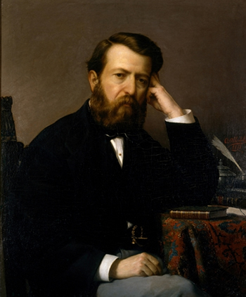 Ritratto di David Chiossone ad opera del pittore O. Allodoli